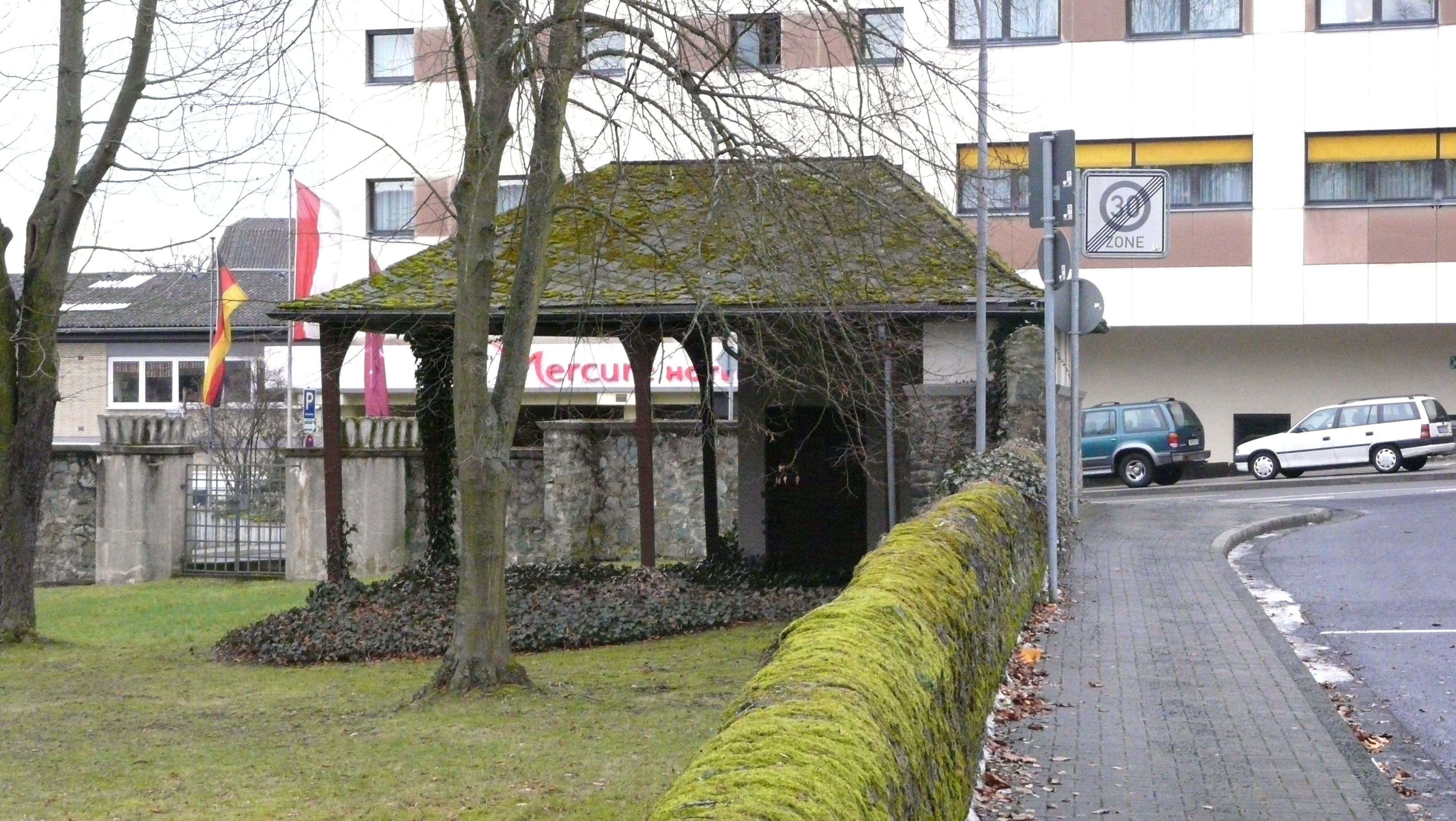 Das Taharahaus auf dem Neuen Jüdischen Friedhof in Wetzlar, Hessen